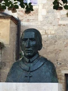 Buste d'Alain de Solminihac. Bronze. Sculpture de Délie Duparc.